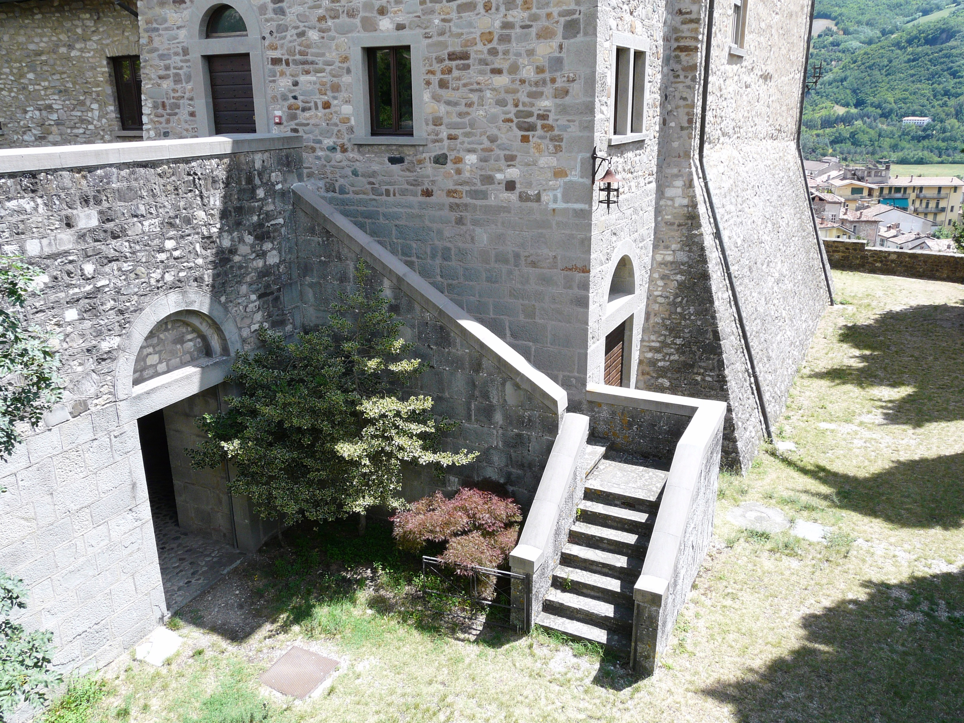 Immagini del castello malaspiniano di Bobbio, Emilia-Romagna, Italia